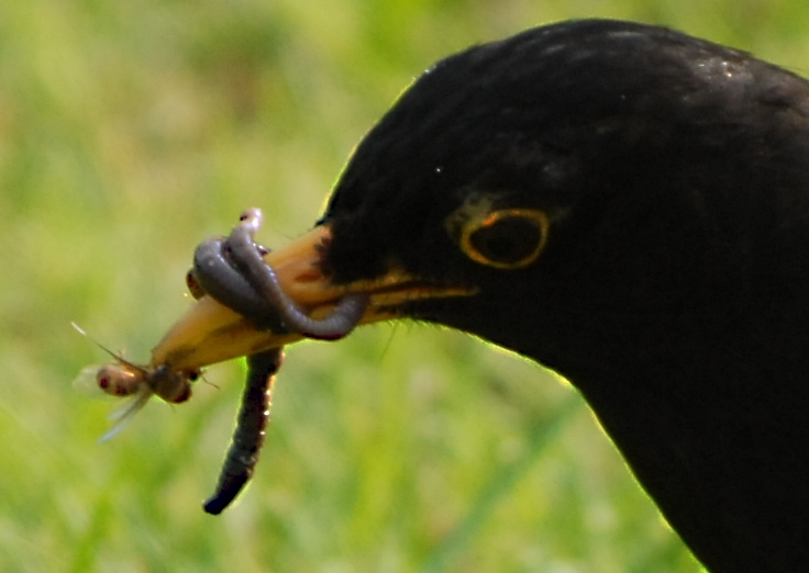 Amsel bei der Futtersuche